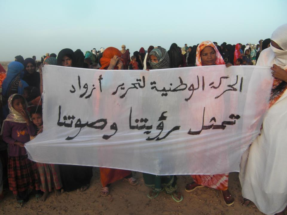 Timbuktu residents rally against control by Islamist group Ansar al-Din. مقاتلو أنصار الدين يفرضون تأويلهم الخاص للشريعة الإسلامية على مناطق شمال مالي المعروفة تاريخيا باعتدالها. Les combattants d'Ansar al-Din veulent imposer leur propre interprétation de la charia dans des régions traditionnellement modérées du nord du Mali.